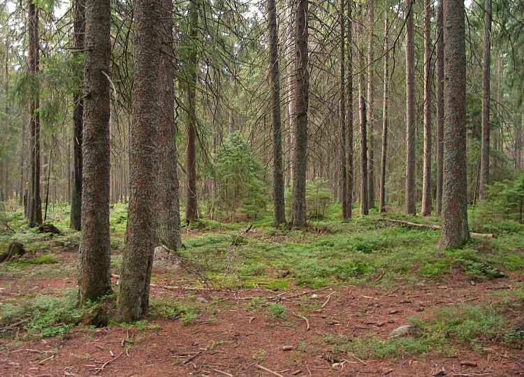 Zdjęcie udostępnione przez Wikipedysta Dixi